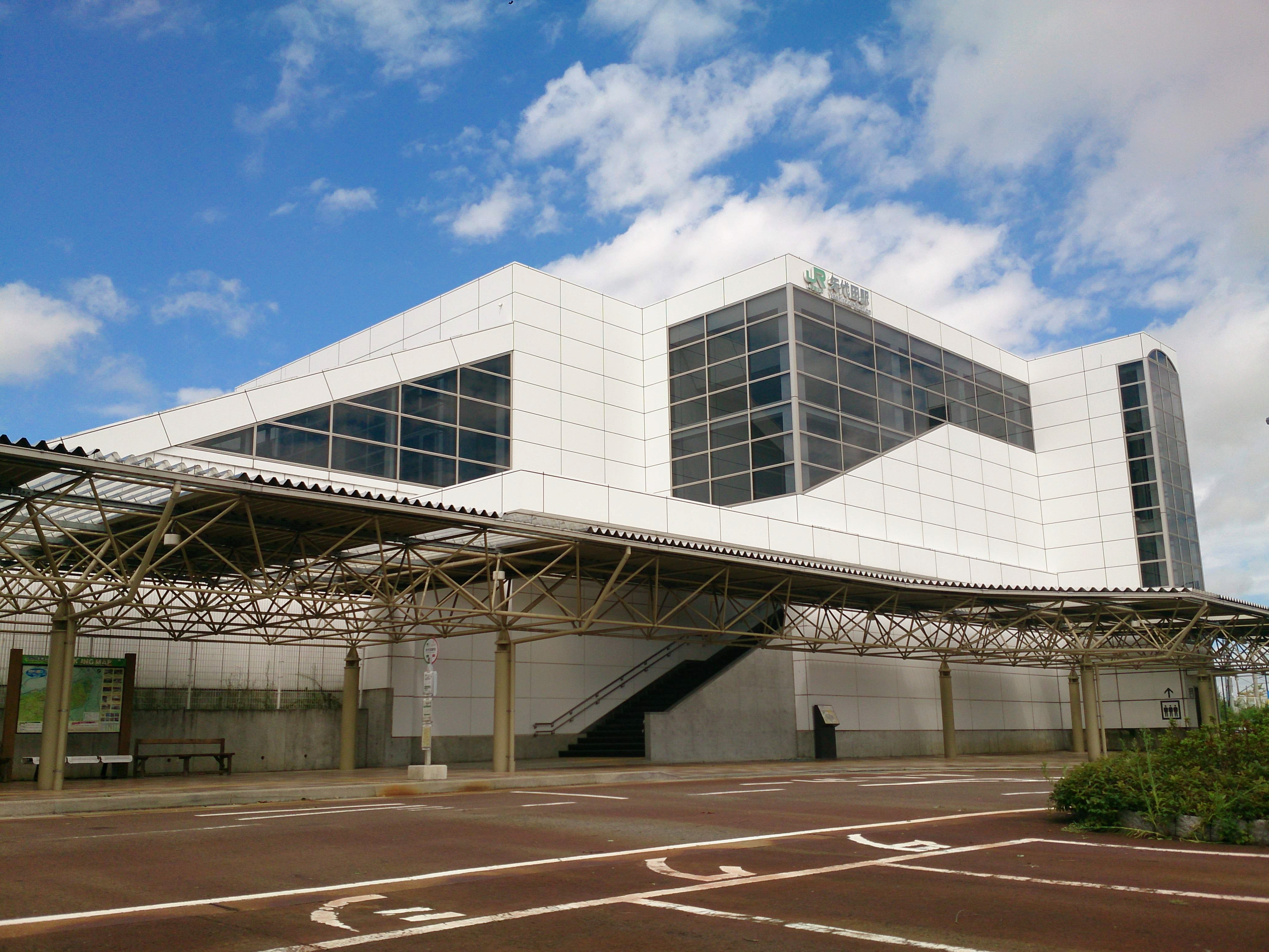 矢代田駅の東口側駅舎